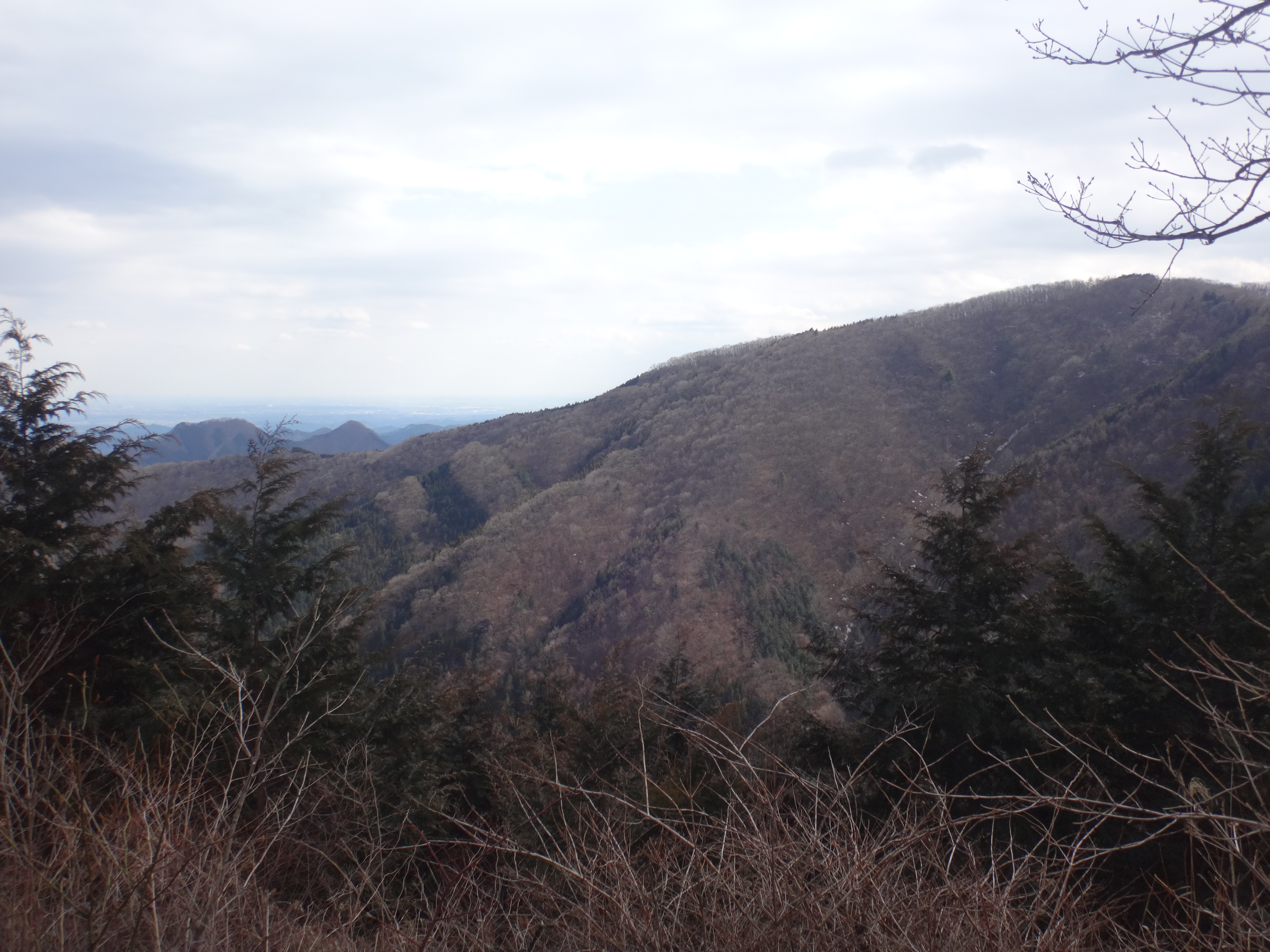 蔦岩山からの武川岳